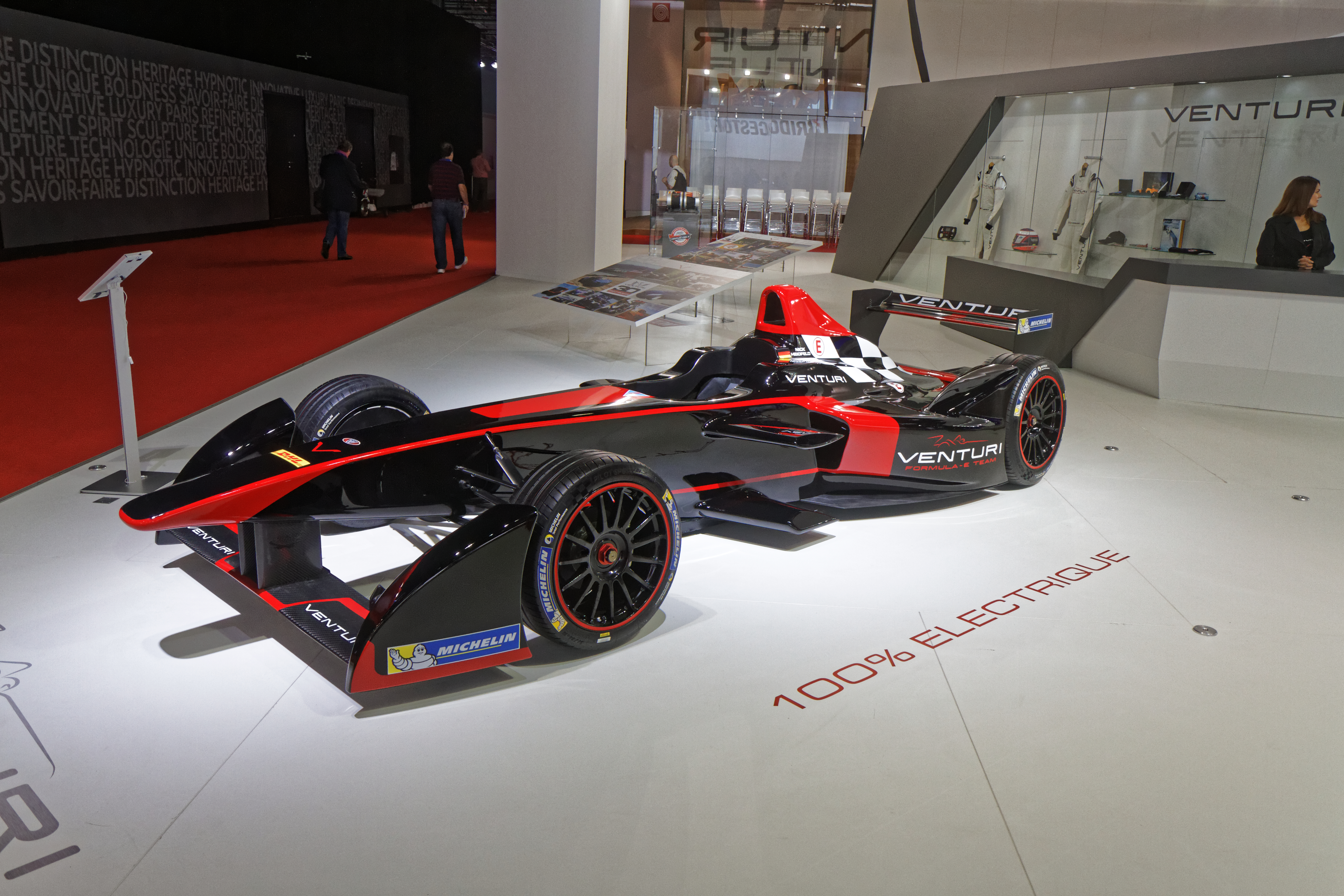 Une Spark-Renault SRT-01E présentée lors du mondial de l'automobile de Paris 2014.